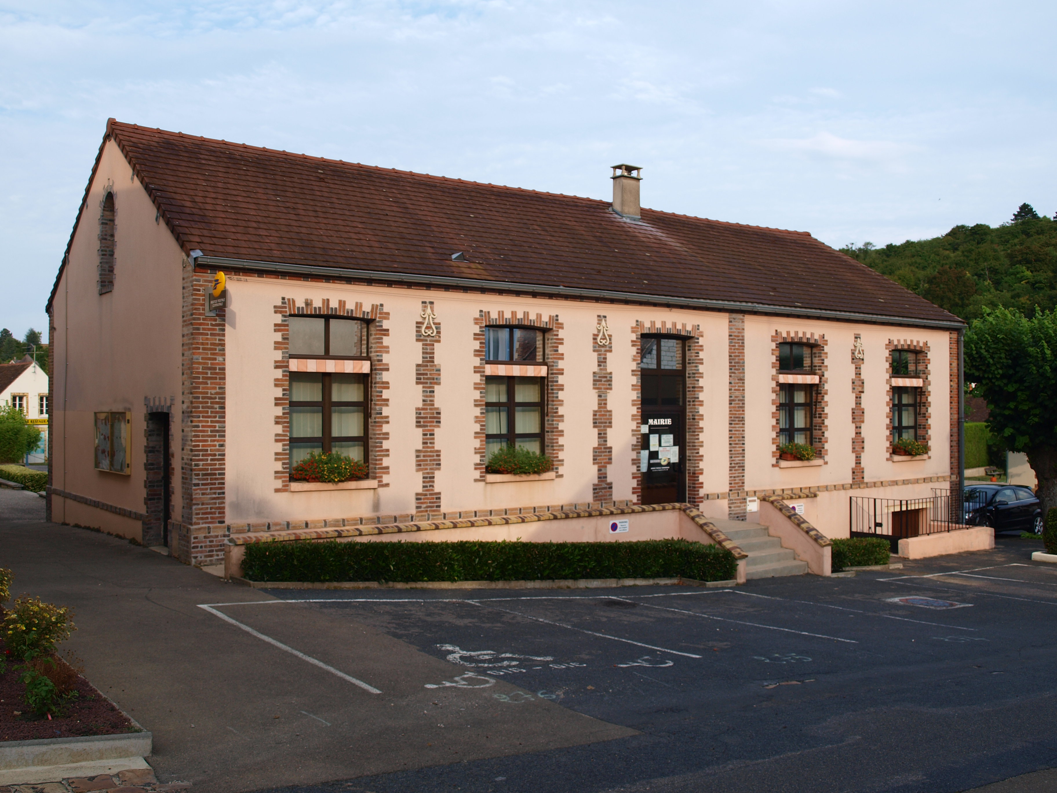 Saint-Martin-du-Tertre (Yonne, France) ; mairie